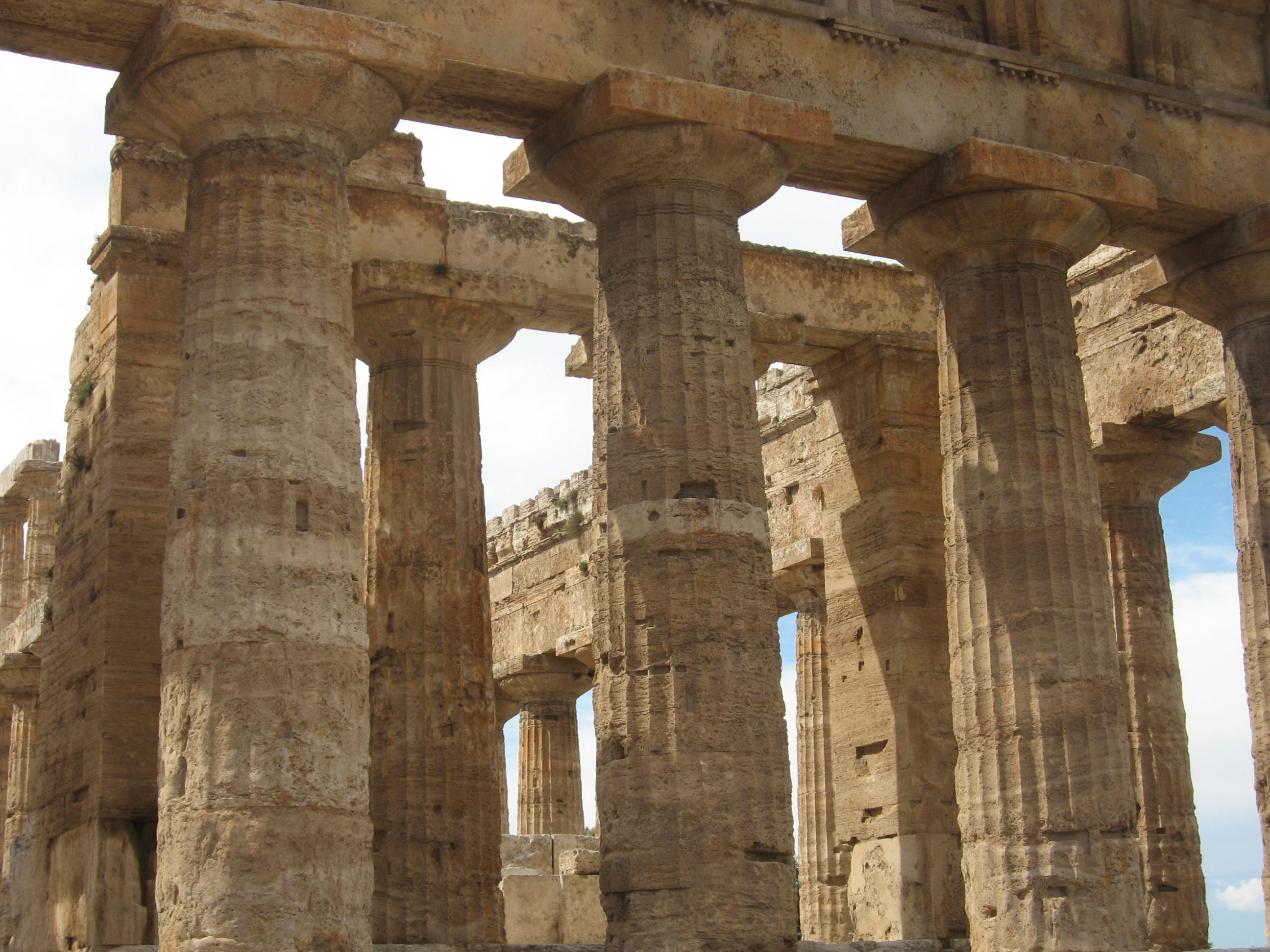 Paestum, Blick in den sogenannter Poseidontempel, der eigentlich ein Heratempel ist. Um 450 v. Chr.